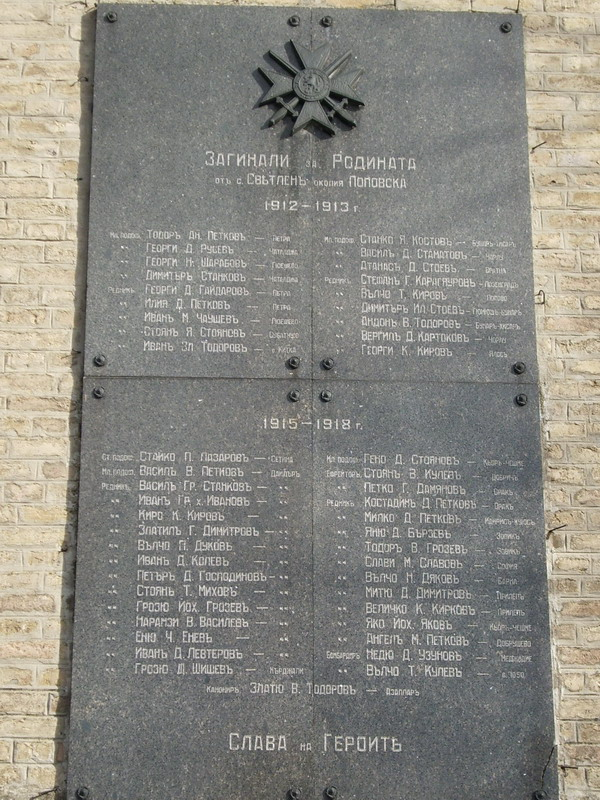 Паметната плоча с имената на загиналите жители на село Светлен, община Попово във войните, поставена на църковната камбанария.